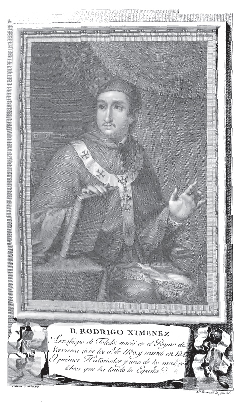 Retrato de Rodrigo Jiménez de Rada.